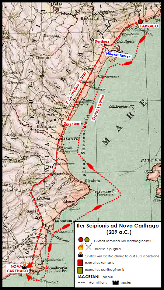 Marcia di Scipione Africano da Tarragona a Cartagena in Spagna nel 209 a.C.